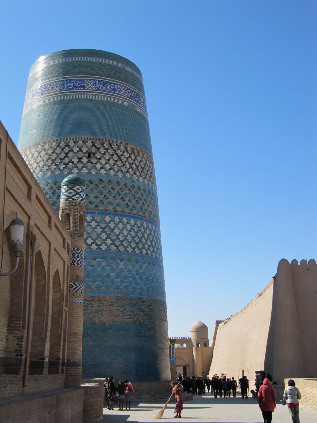 links das unvollendete Minarett Kalta Minor in der Altstadt von Chiwa; rechts die Stadtmauer